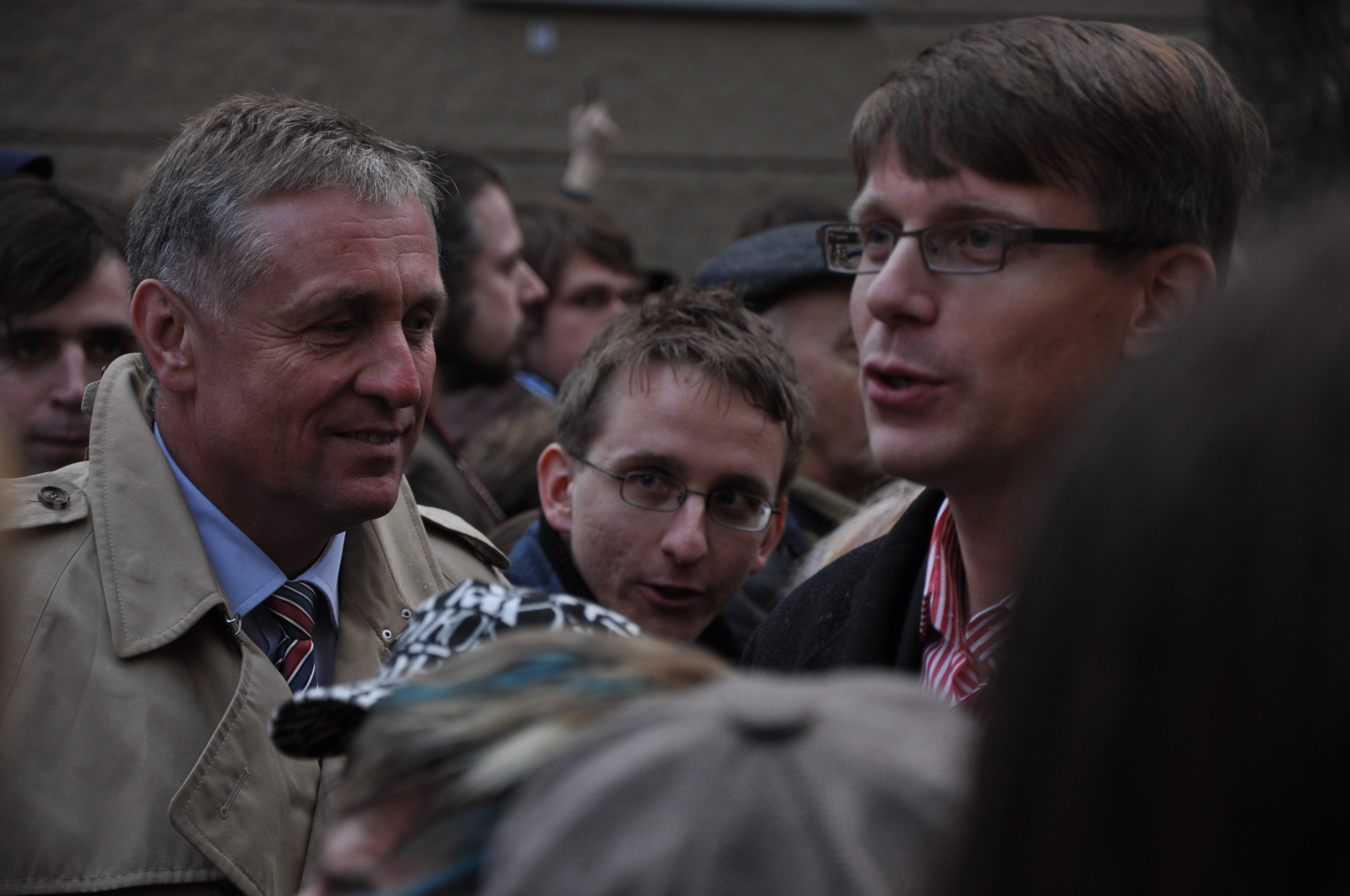 Mirek Topolánek na Albertově 17. listopadu 2009.